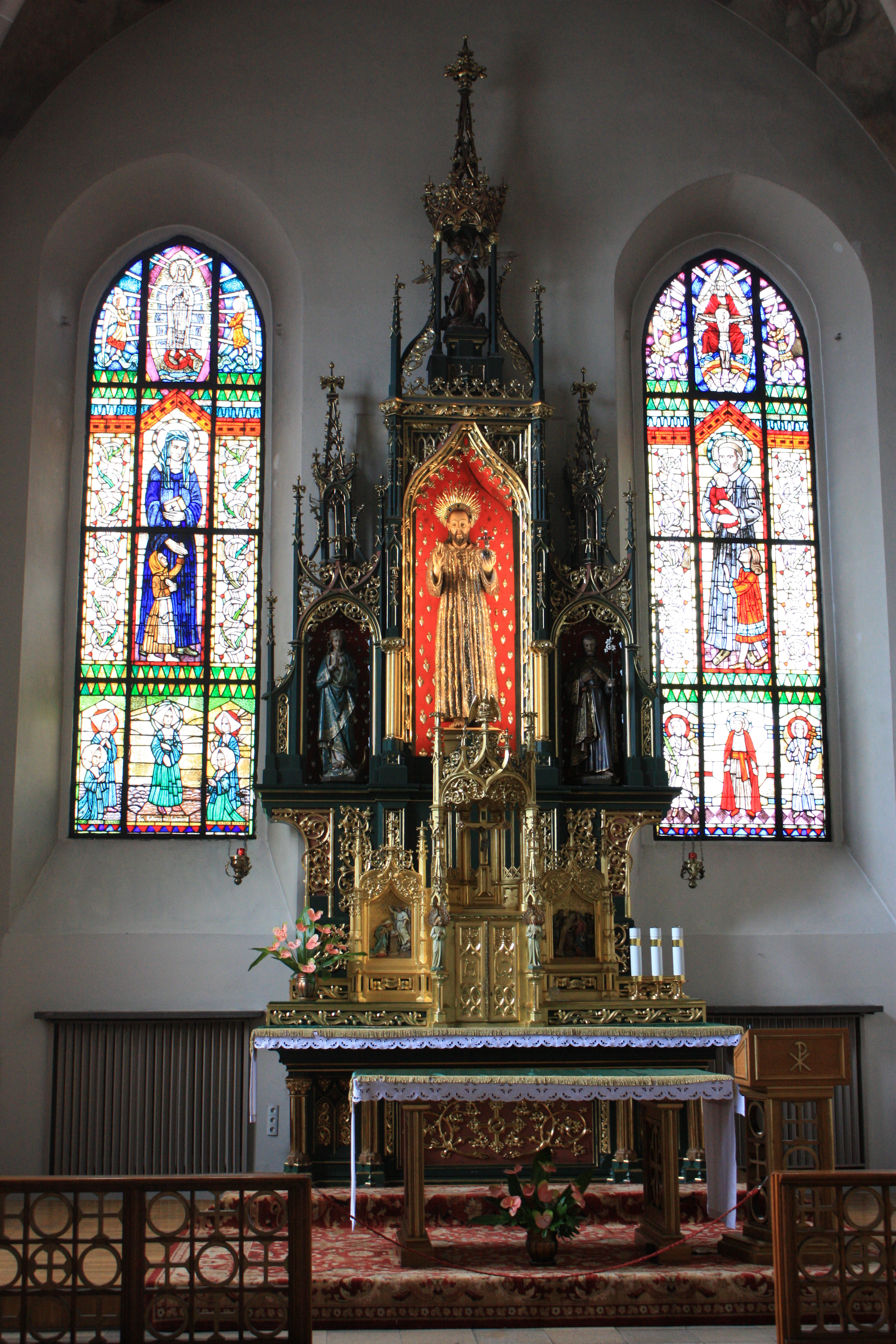 Kościół Przemienienia Pańskiego w Poznaniu. Ołtarz główny.